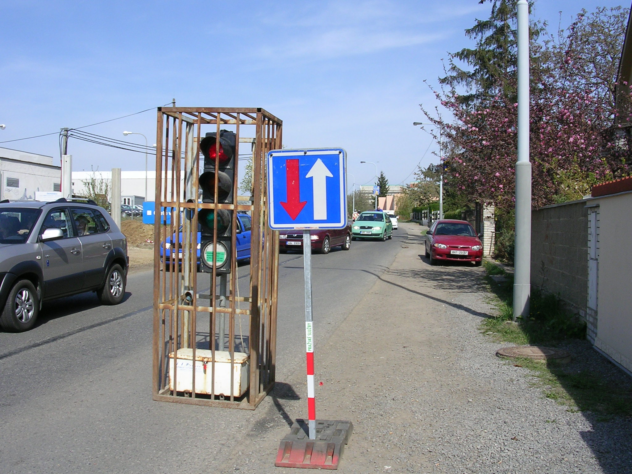 Mobilní semafor se signálem „Stůj. “Smíchovská ulice, Řeporyje, Praha.